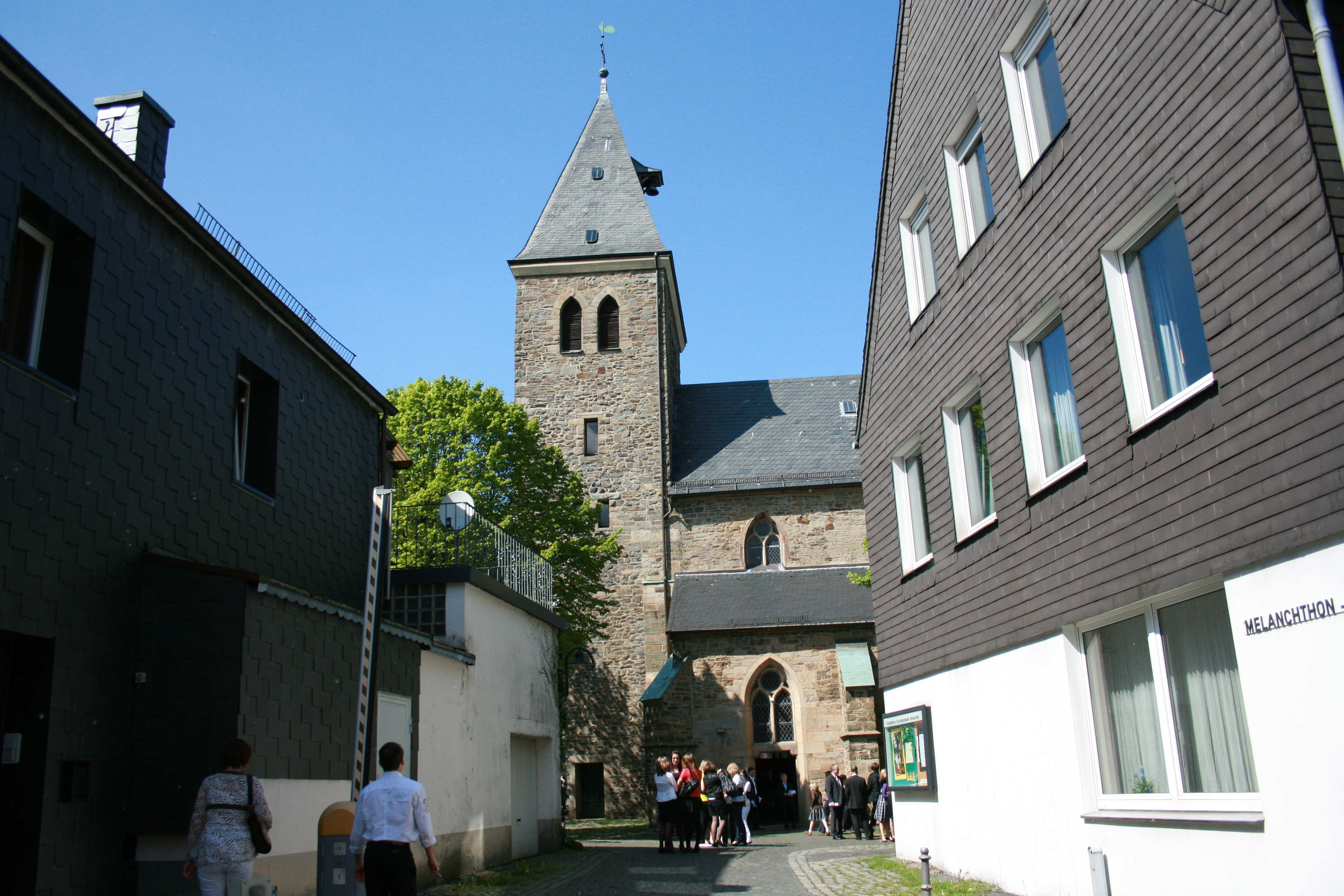 Evangelische Jakobus-Kirche an der Denkmalstraße in Breckerfeld